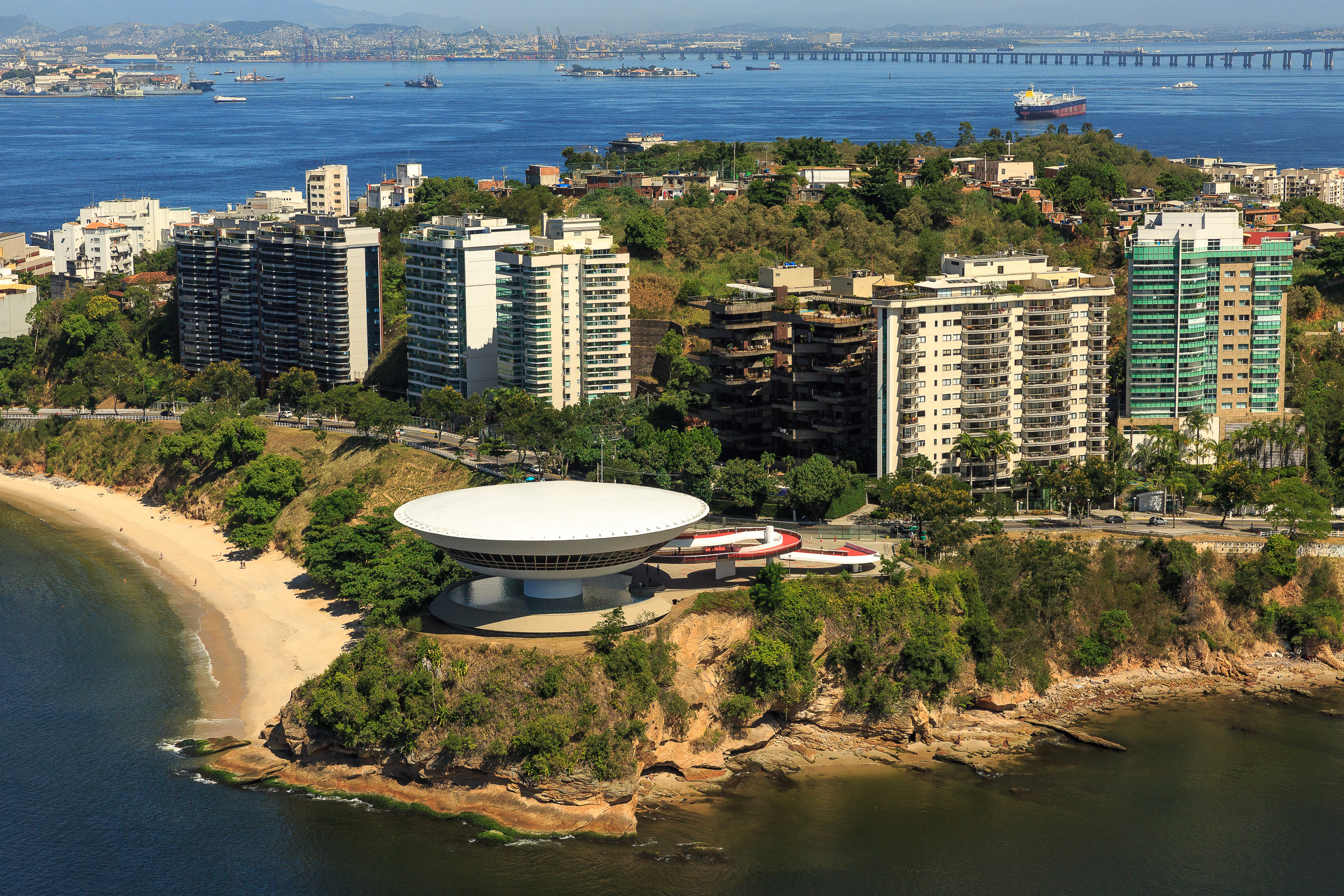 Vista aérea do Museu de Arte Contemporânea de Niterói